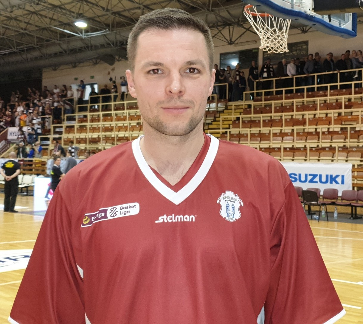 Maciej Raczyński